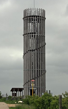 Akátová věž